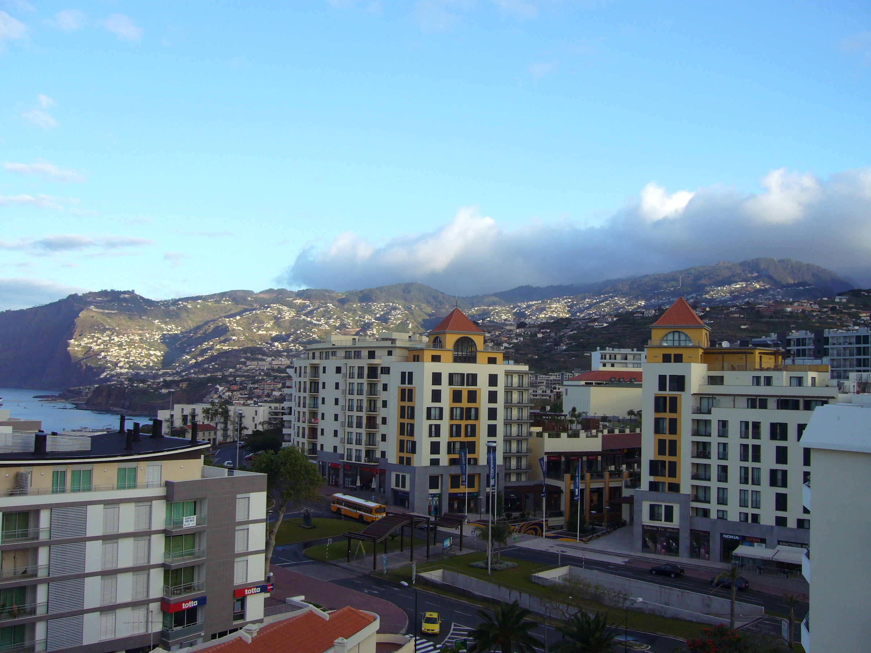 Moderní nákupní a zábavní centrum Forum Madeira na Avenida Monumental. Vzadu vlevo Cabo Girão a Câmara de Lobos.